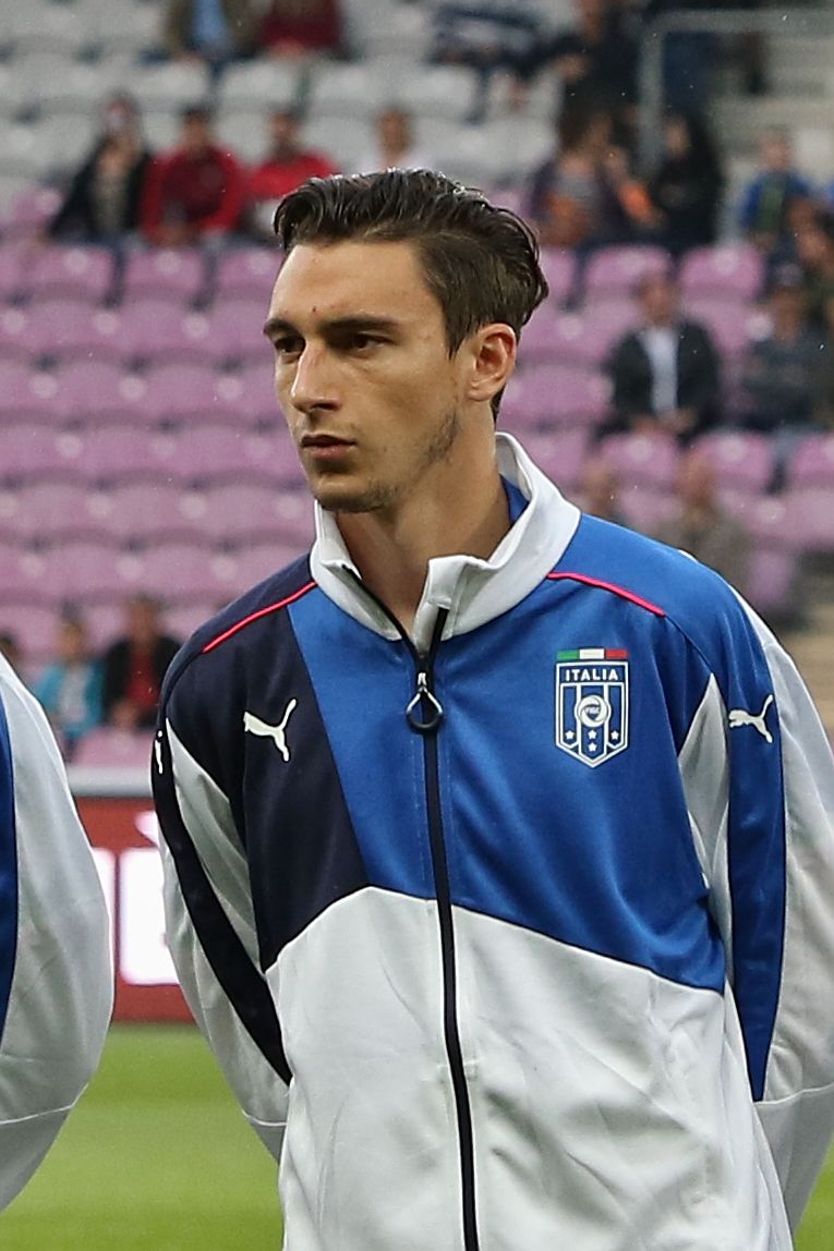 20150616 - Portugal - Italie - Genève - Matteo Darmian